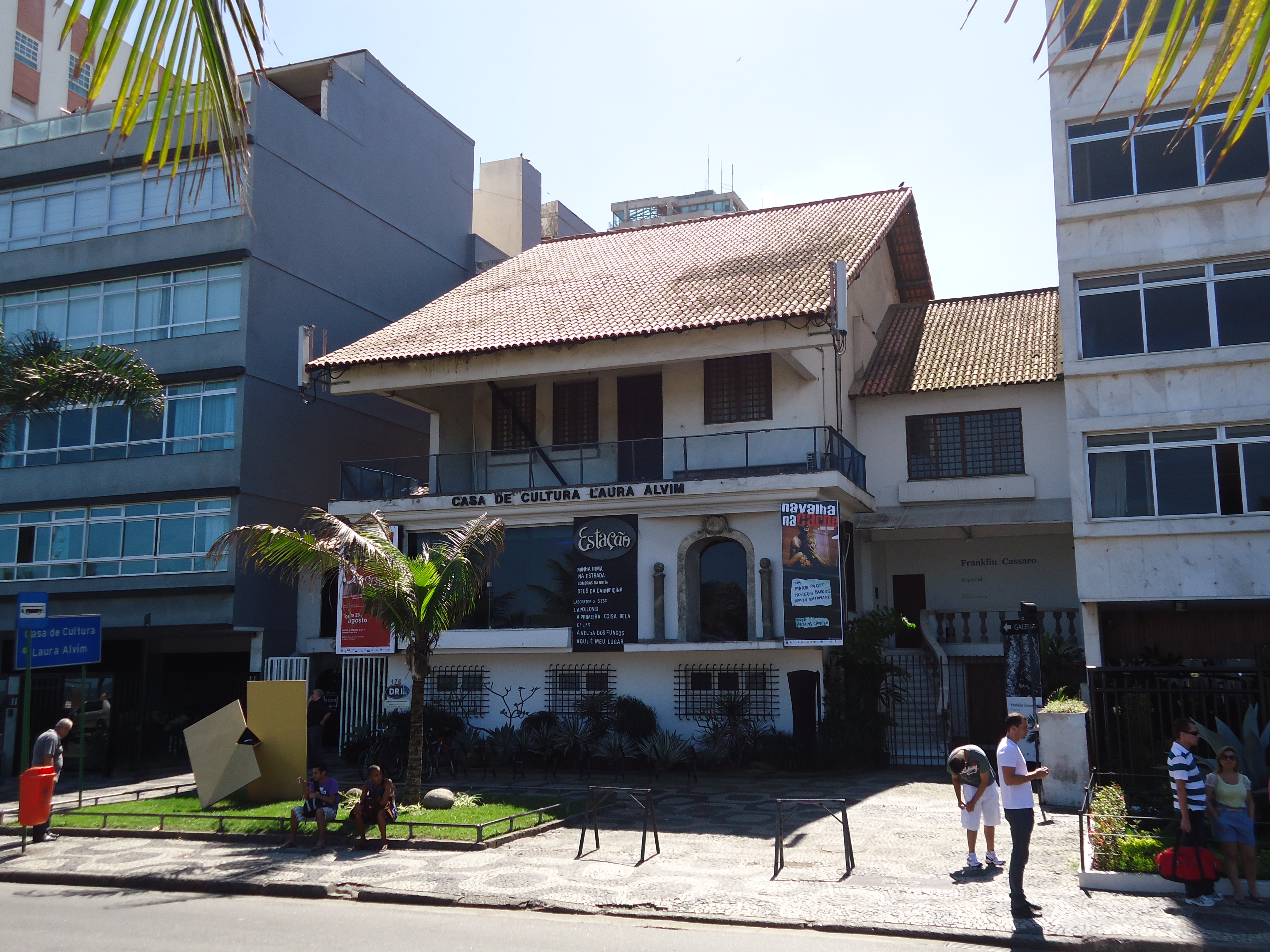 Casa de Cultura Laura Alvim, Av. Vieira Souto n.º 176, Ipanema, Rio de Janeiro, RJ, Brasil.